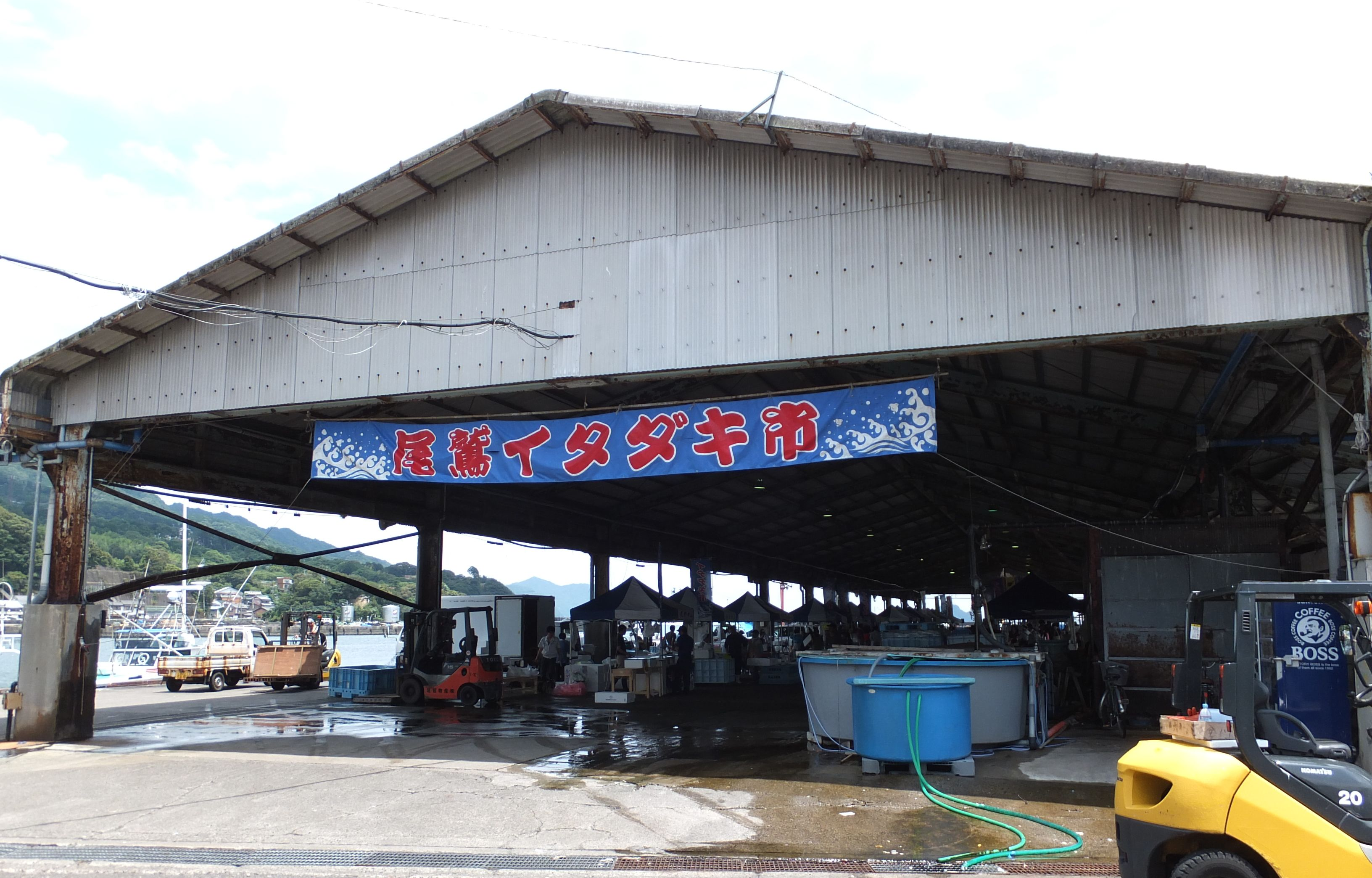 尾鷲イタダキ市